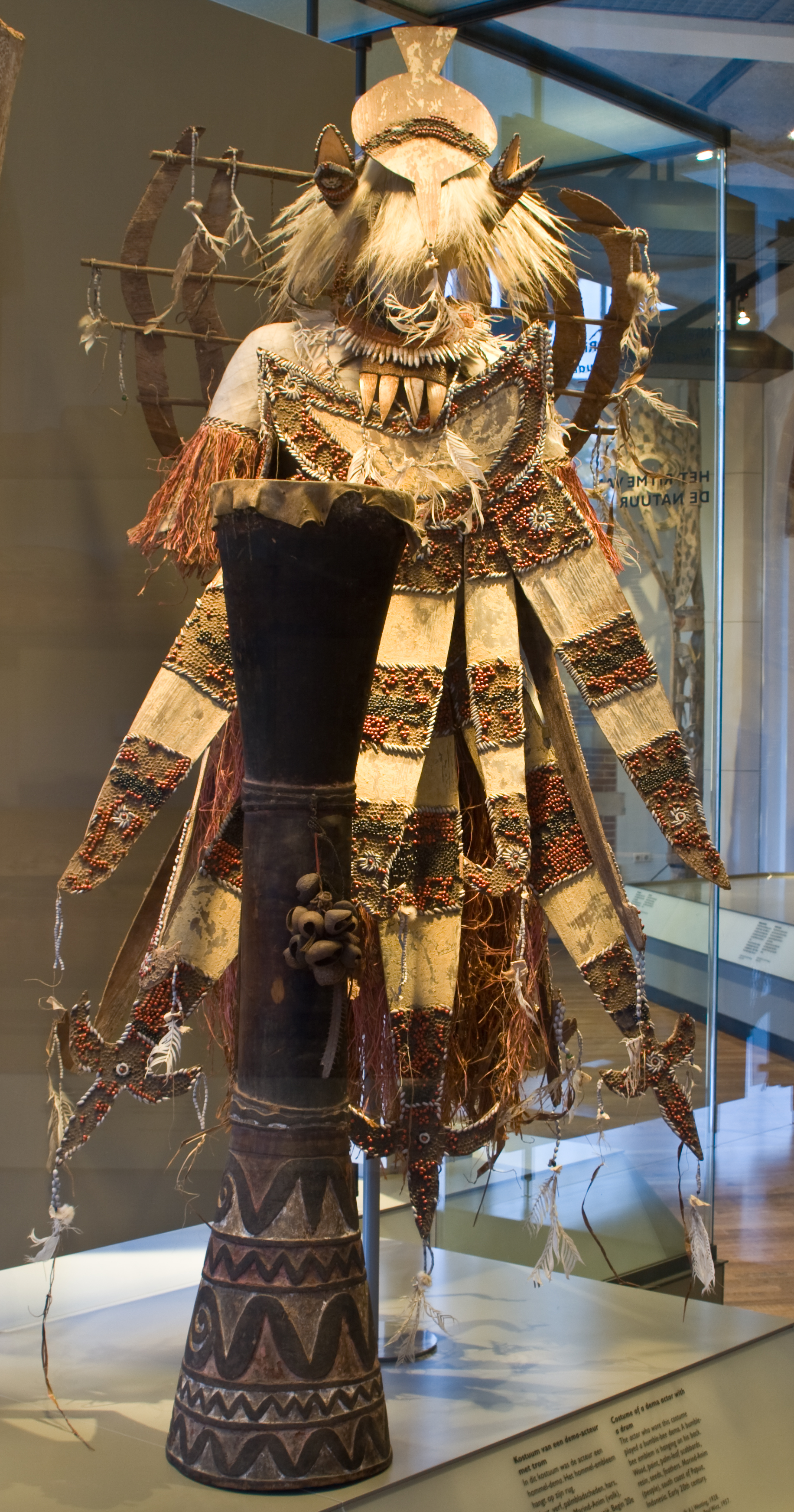 Dema-Vitrine (526-5 A t/m K) Tropenmuseum - Dema-vitrine